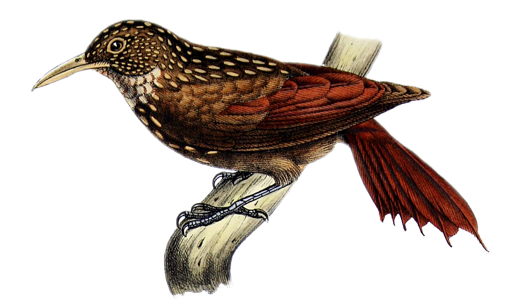 Dendrornis multiguttatus de la Fres et Dev. = Xiphorhynchus obsoletus obsoletus (Lichtenstein, 1820)